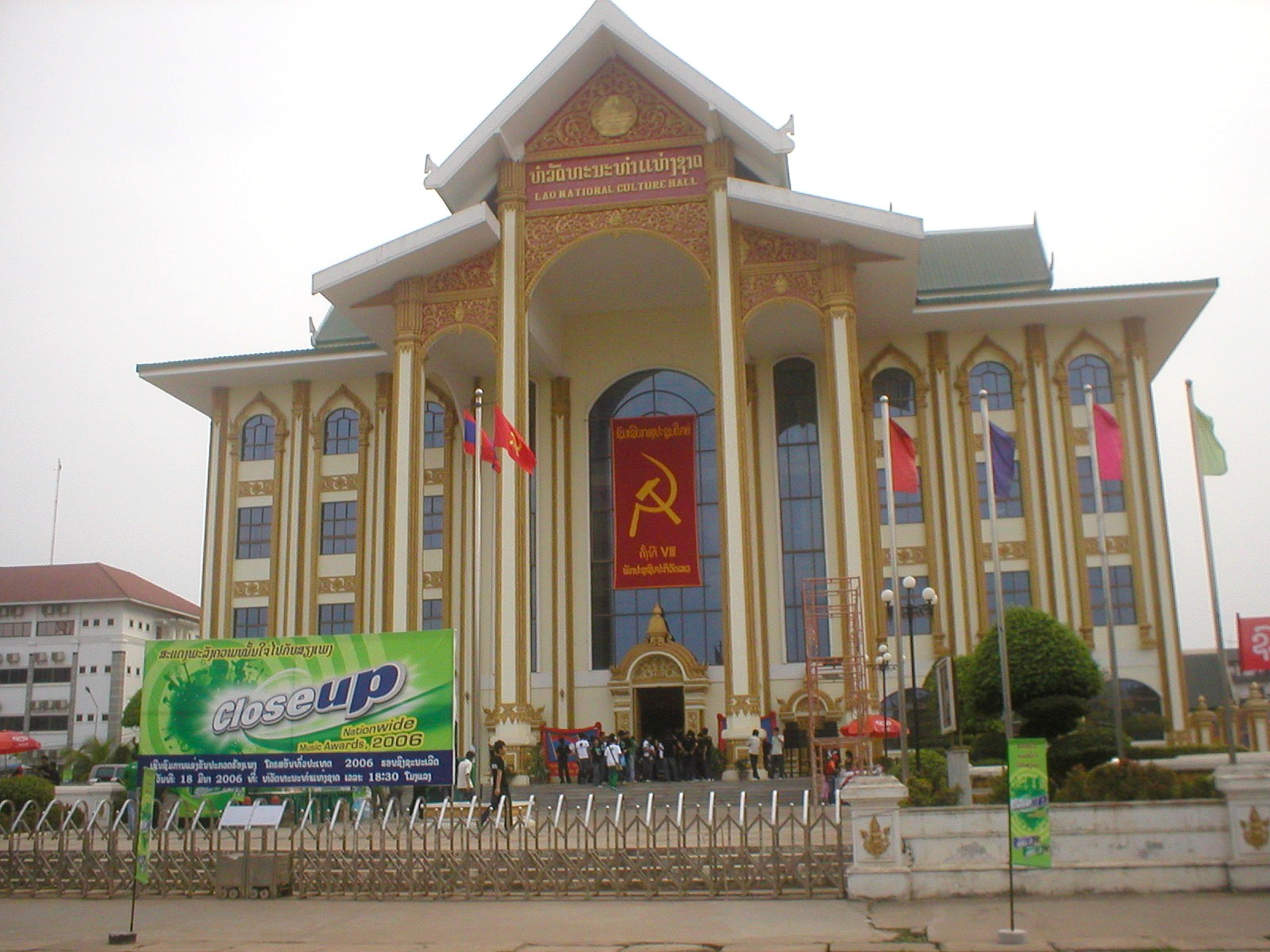 Bâtiment du Centre Culturel National à Vientiane